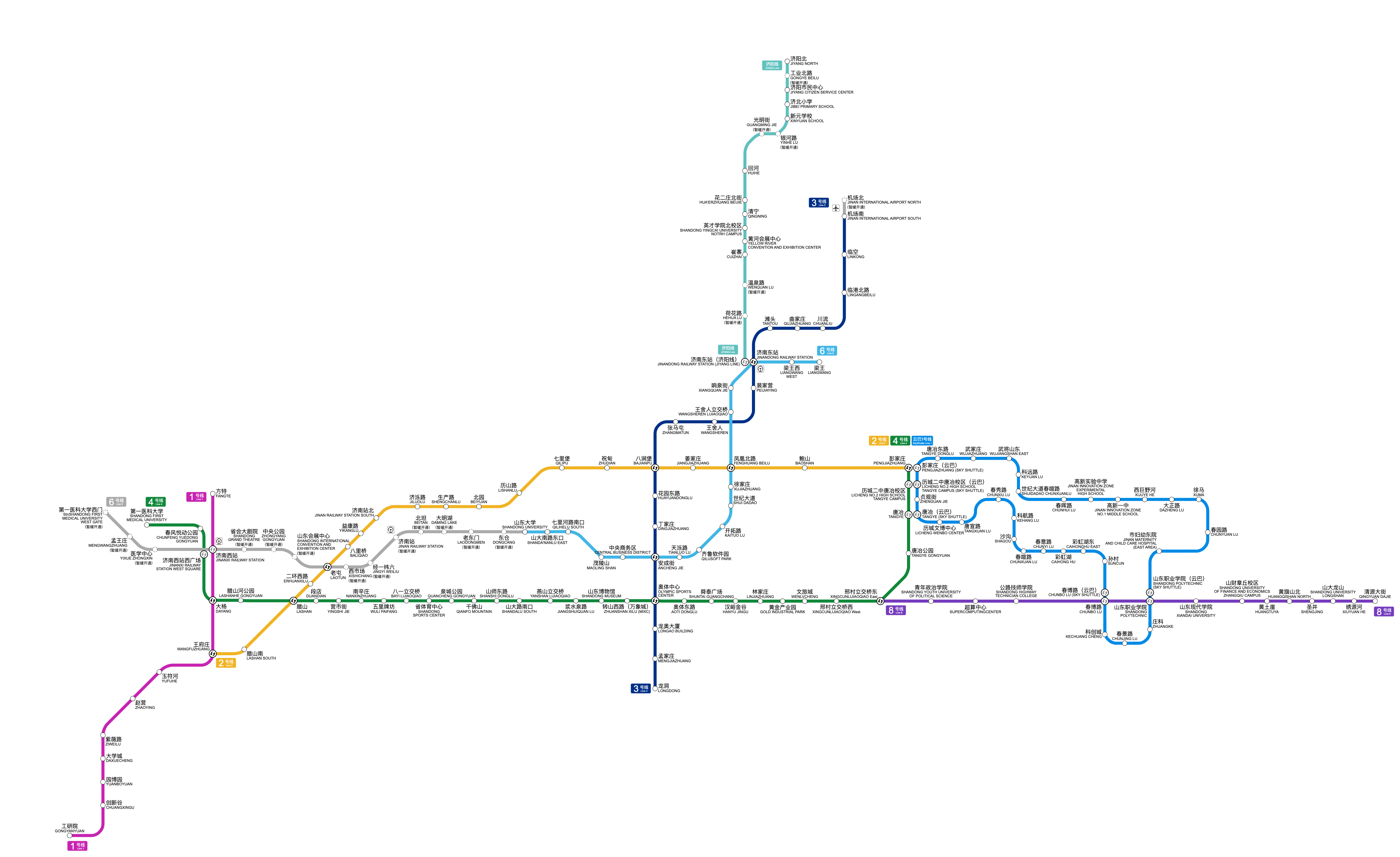 中文（中国大陆）: 济南地铁线路图